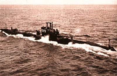 אח"י תנין